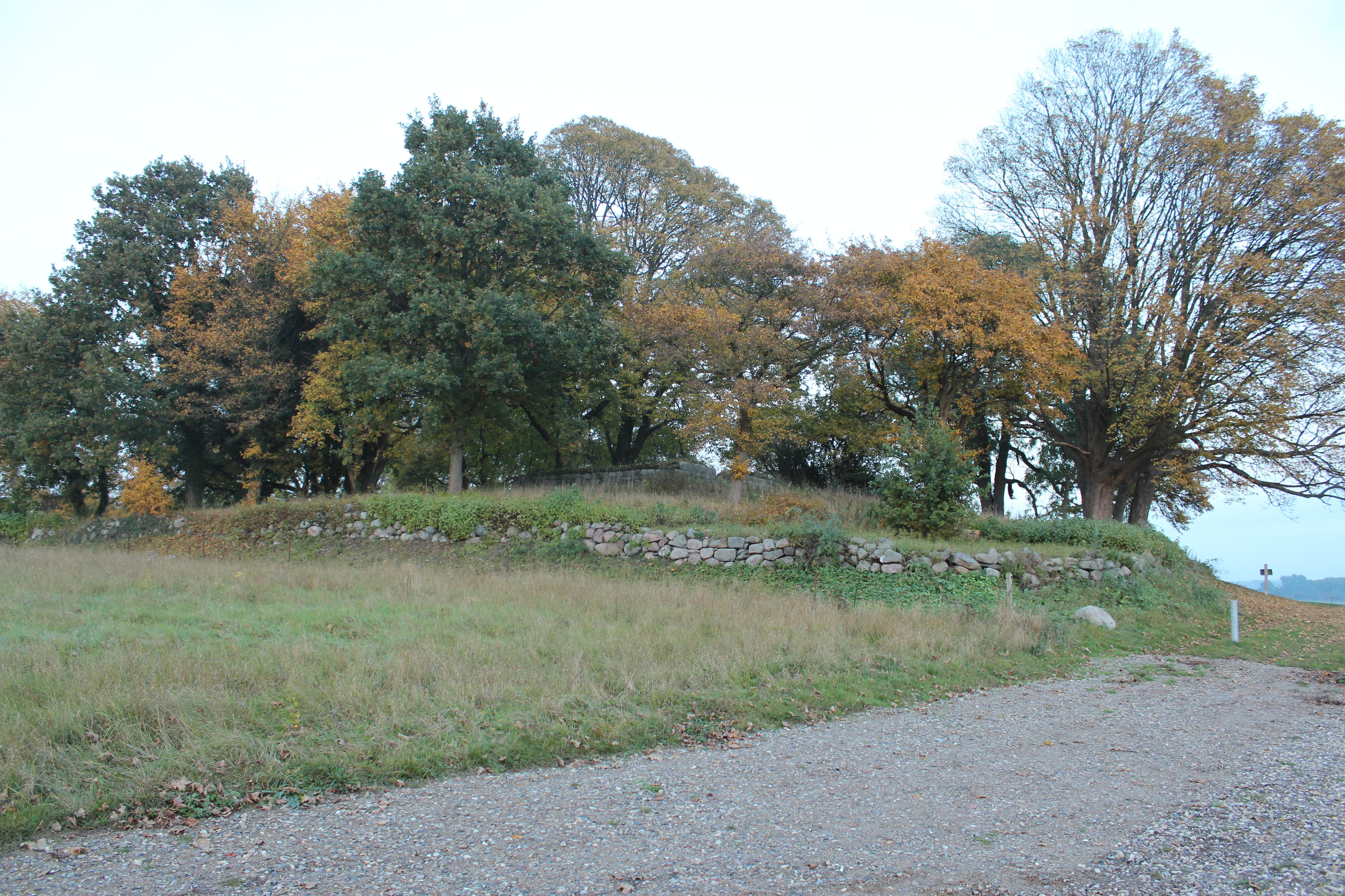 Ruinen set fra parkeringspladsen